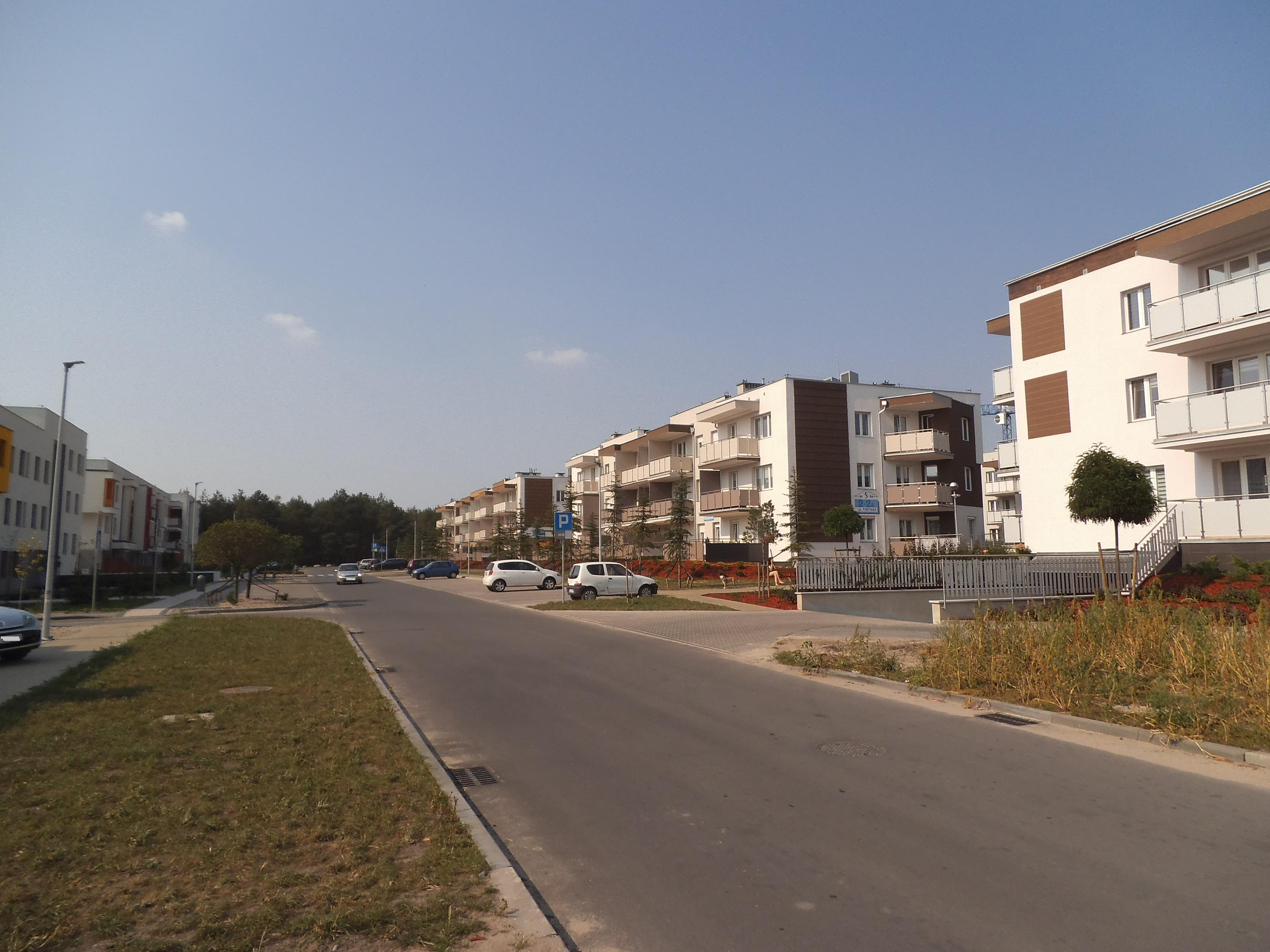 Ulica Freytaga w Toruniu